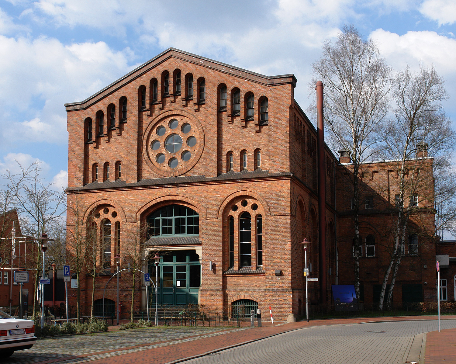 Nordwolle in Delmenhorst. Ehemaliges Turbinenhaus, die „Kathedrale der Arbeit“. Erbaut 1902, Architekt Henrich Deetjen